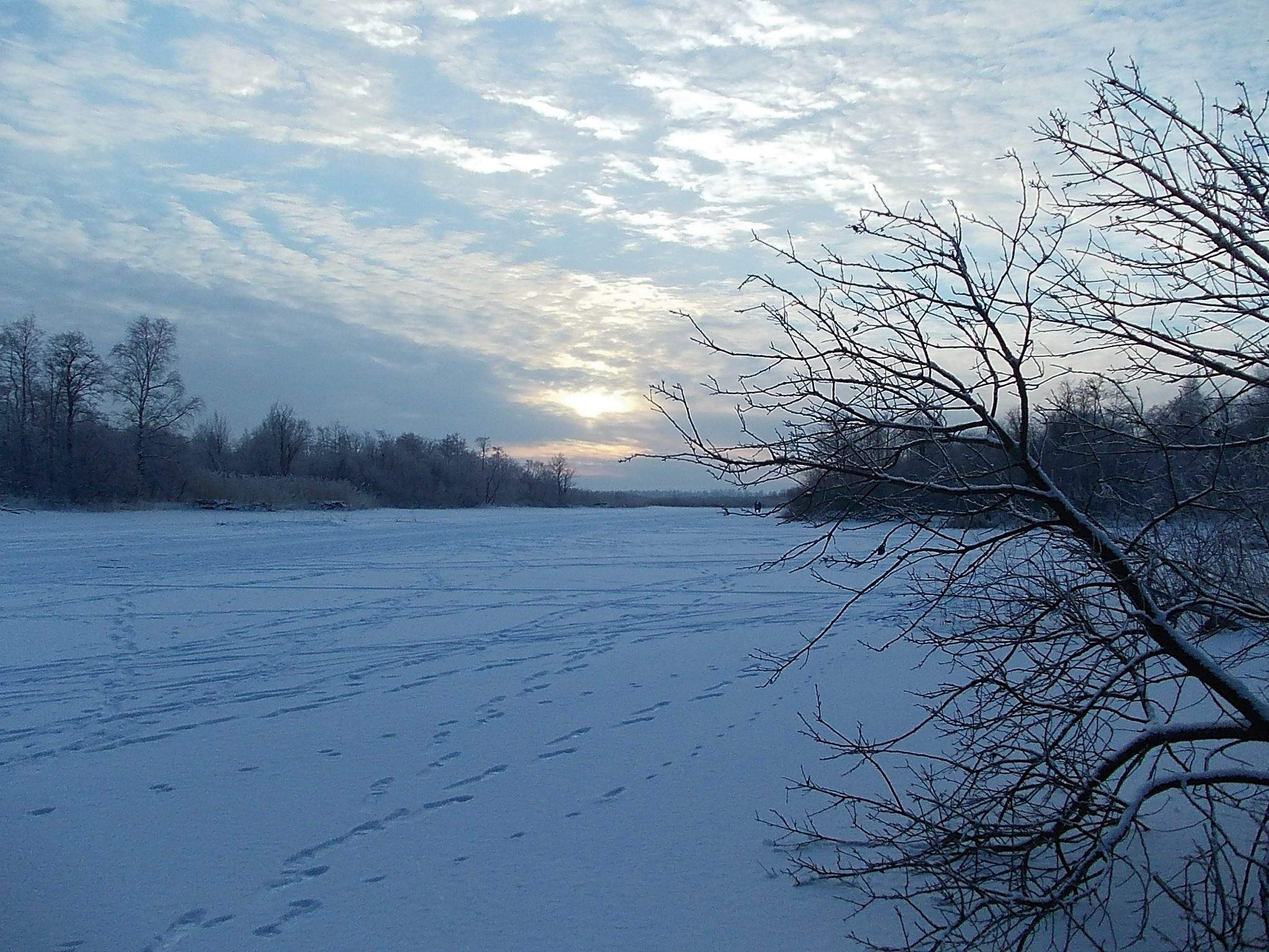 Река Каменка зимой